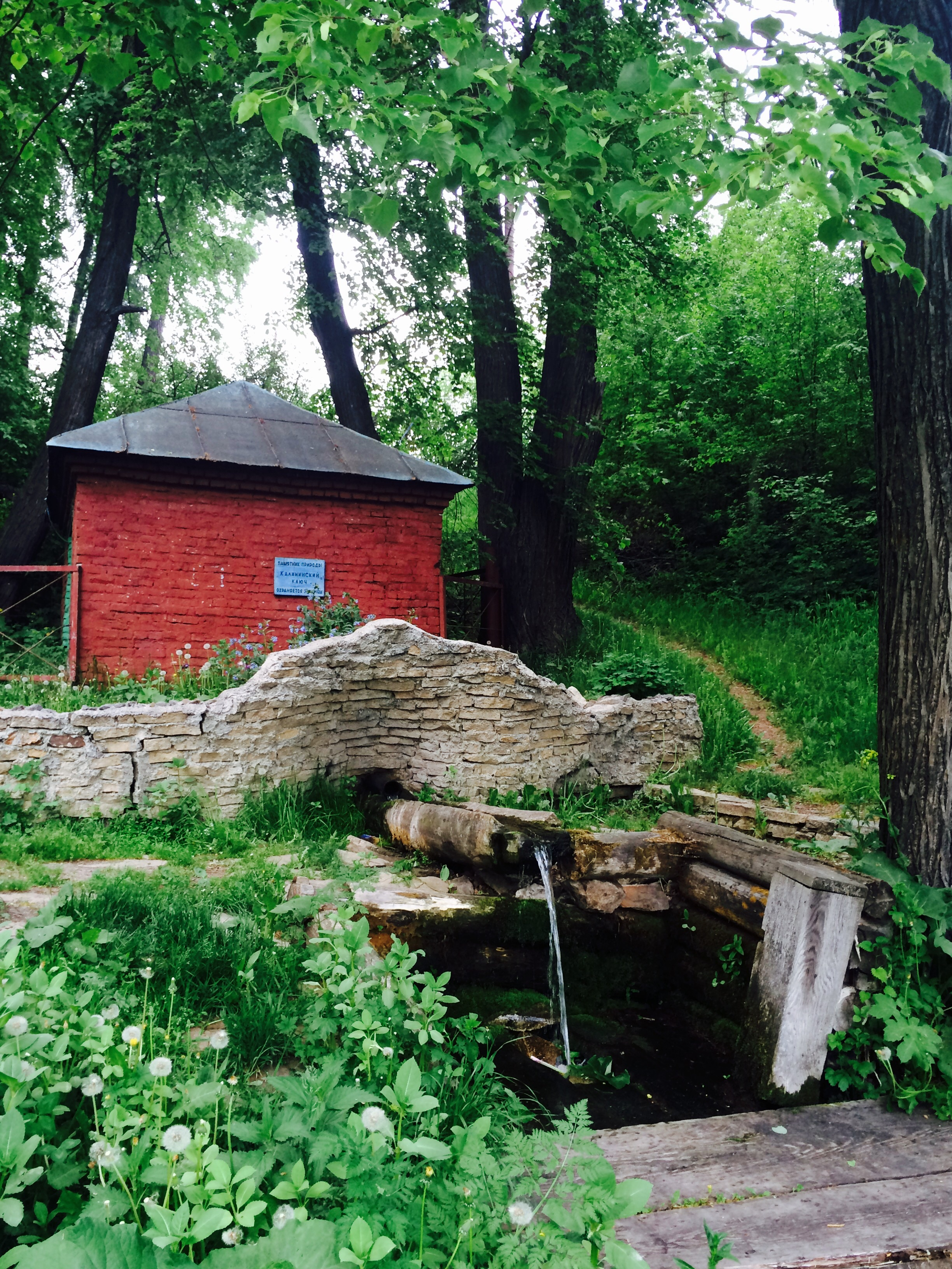 Калиновский ключ, Артёмовский район, Свердловской области This image is related to the protected area of Russia number 6610035